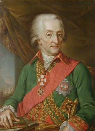 Граф Иван Евстафьевич Ферзен (1739—1800)